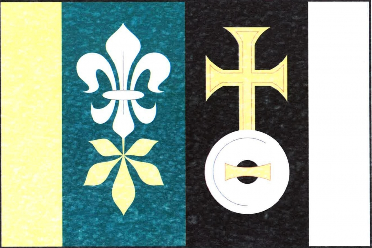 vlajka, Černovice, okres Domažlice